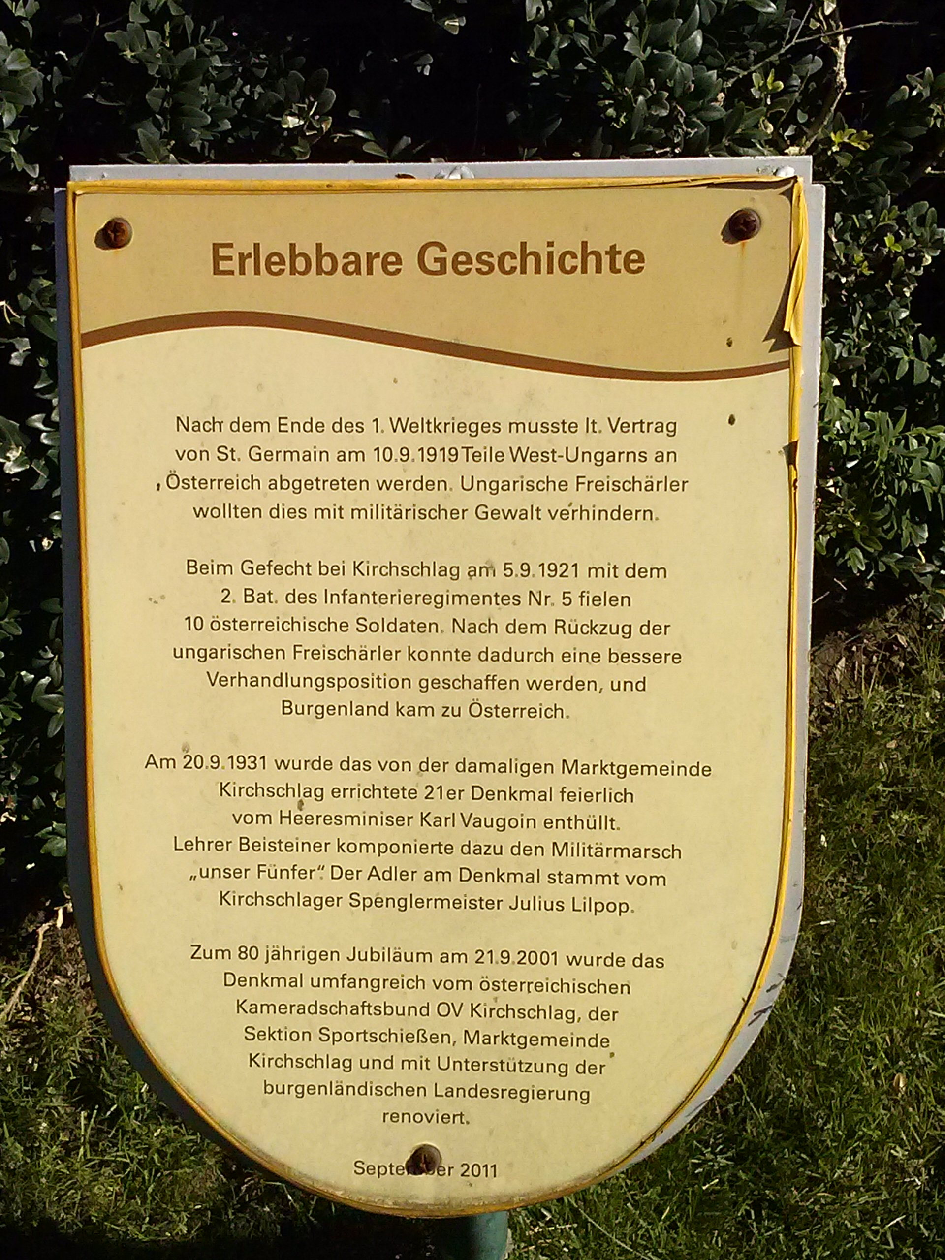 Infotafel zu Denkmal an die Toten des Bundesheeres während der Landnahme des Burgenlandes 1921.